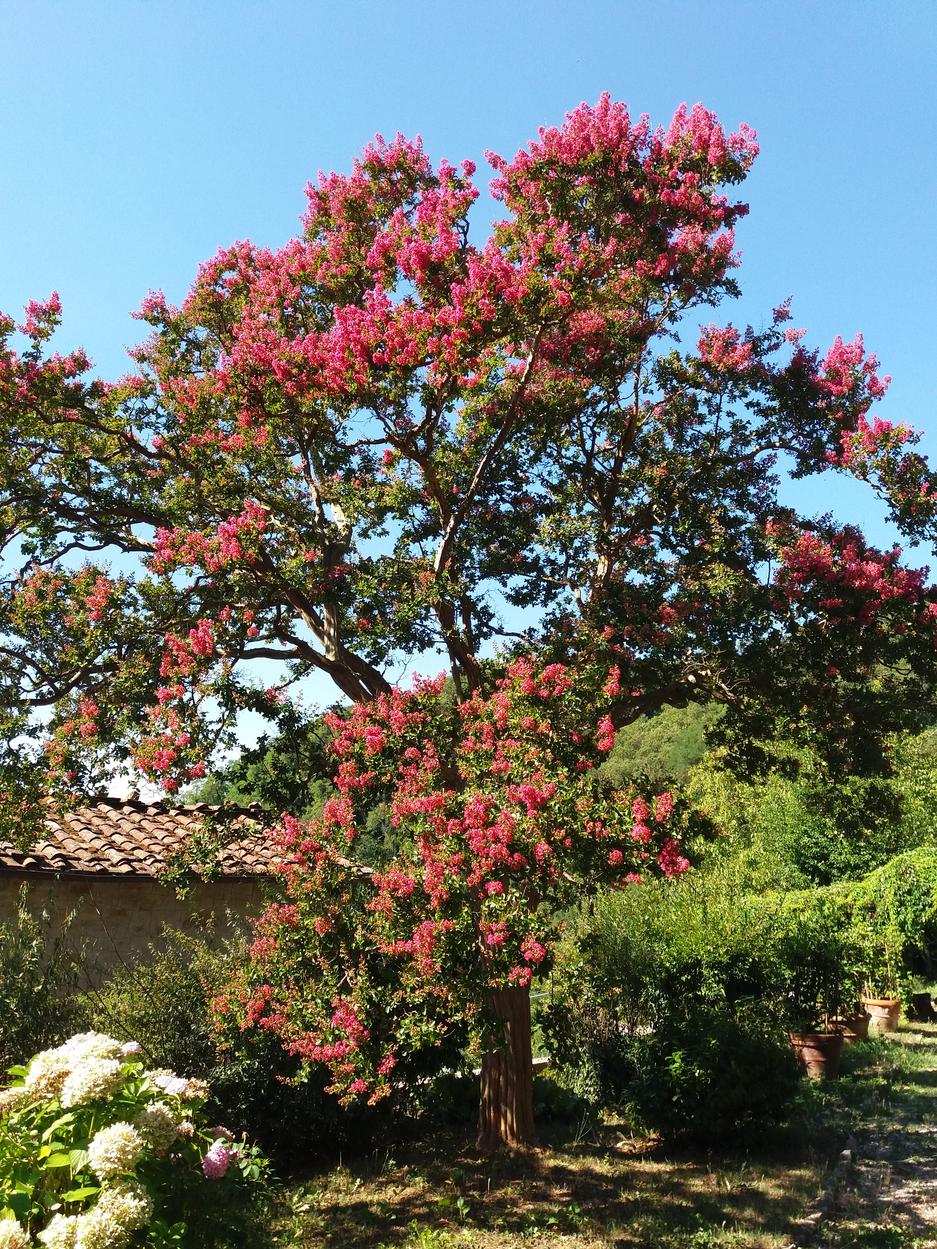 lagerstroemia rossa a Celle dei Puccini (LU)